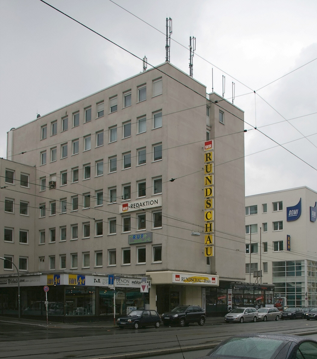 Das Pressehaus der Westfälischen Rundschau am Ostenhellweg in Dortmund (Blick vom Brüderweg)